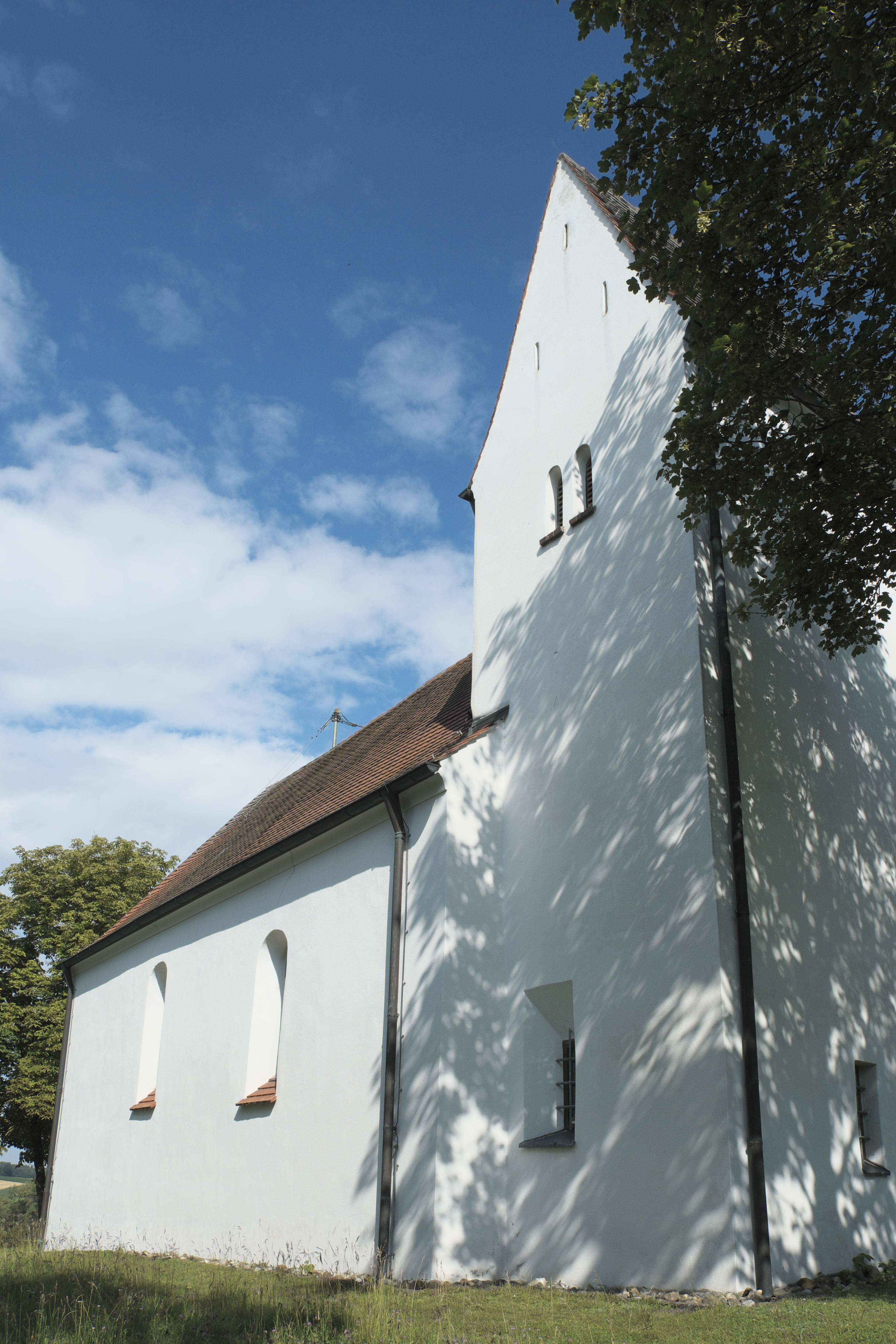 Katholische Filialkirche St. Johannes Evangelist in Eschling (Burgheim) im oberbayerischen Landkreis Neuburg-Schrobenhausen (Bayern/Deutschland)